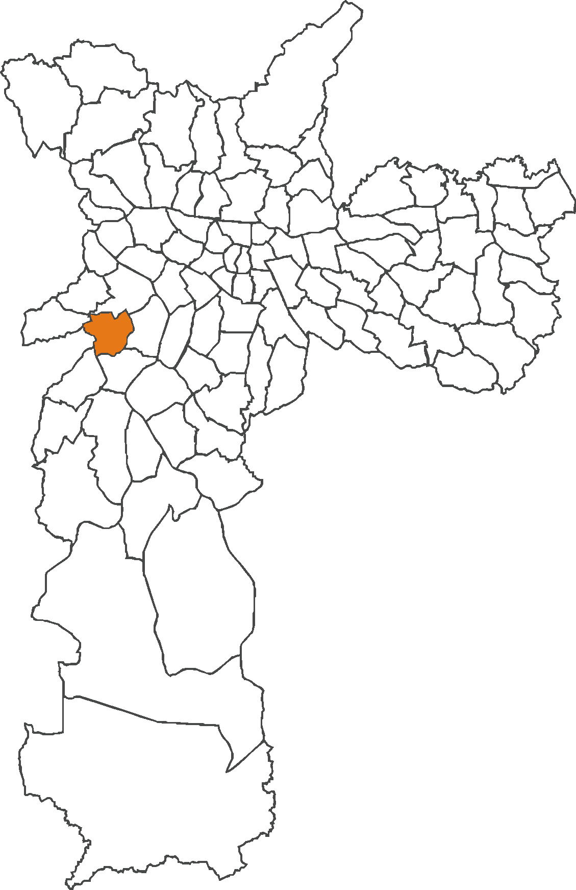 Localização do distrito de Vila Sônia no município de São Paulo.